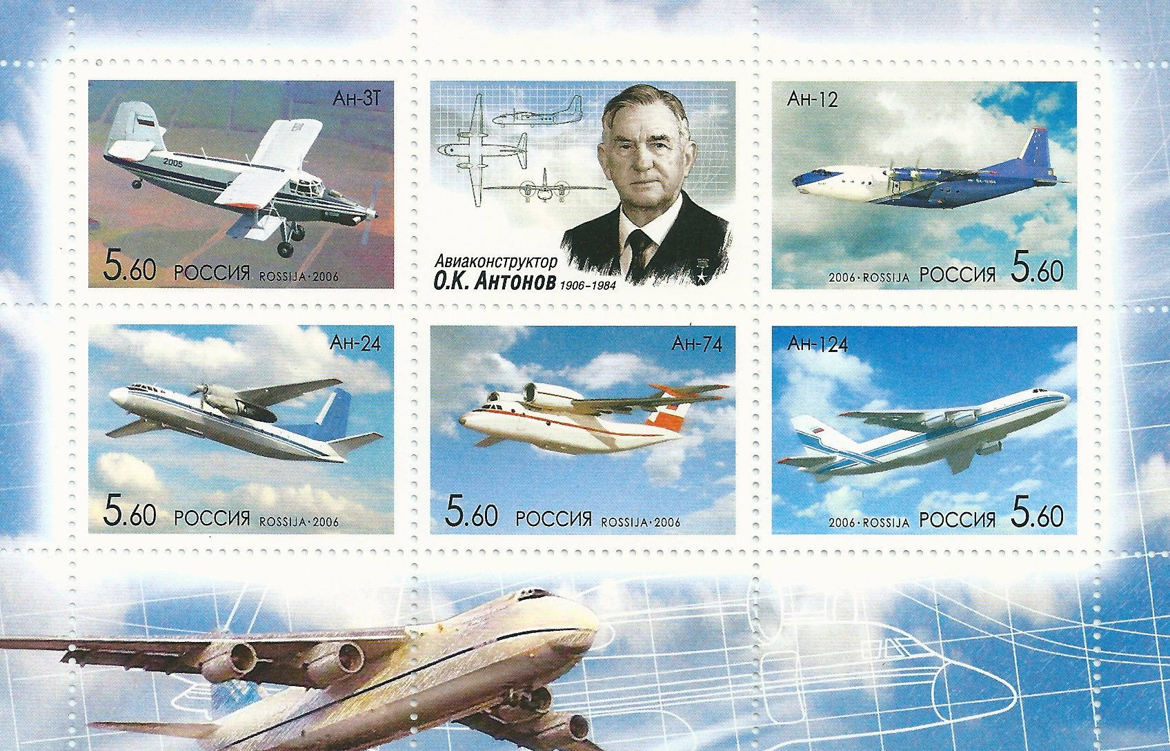 Оле́г Константи́нович Анто́нов — советский авиаконструктор, доктор наук, академик Академии наук УССР (1968), академик Академии наук СССР (1981) на почтовой марке Почты России 2007 года.№№ по каталогу: 1063-1067